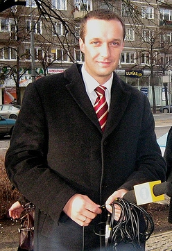 Maciej Mazur